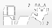 インターネットスラングおよび2ちゃんねるのAA、どうしてこうなったの画像